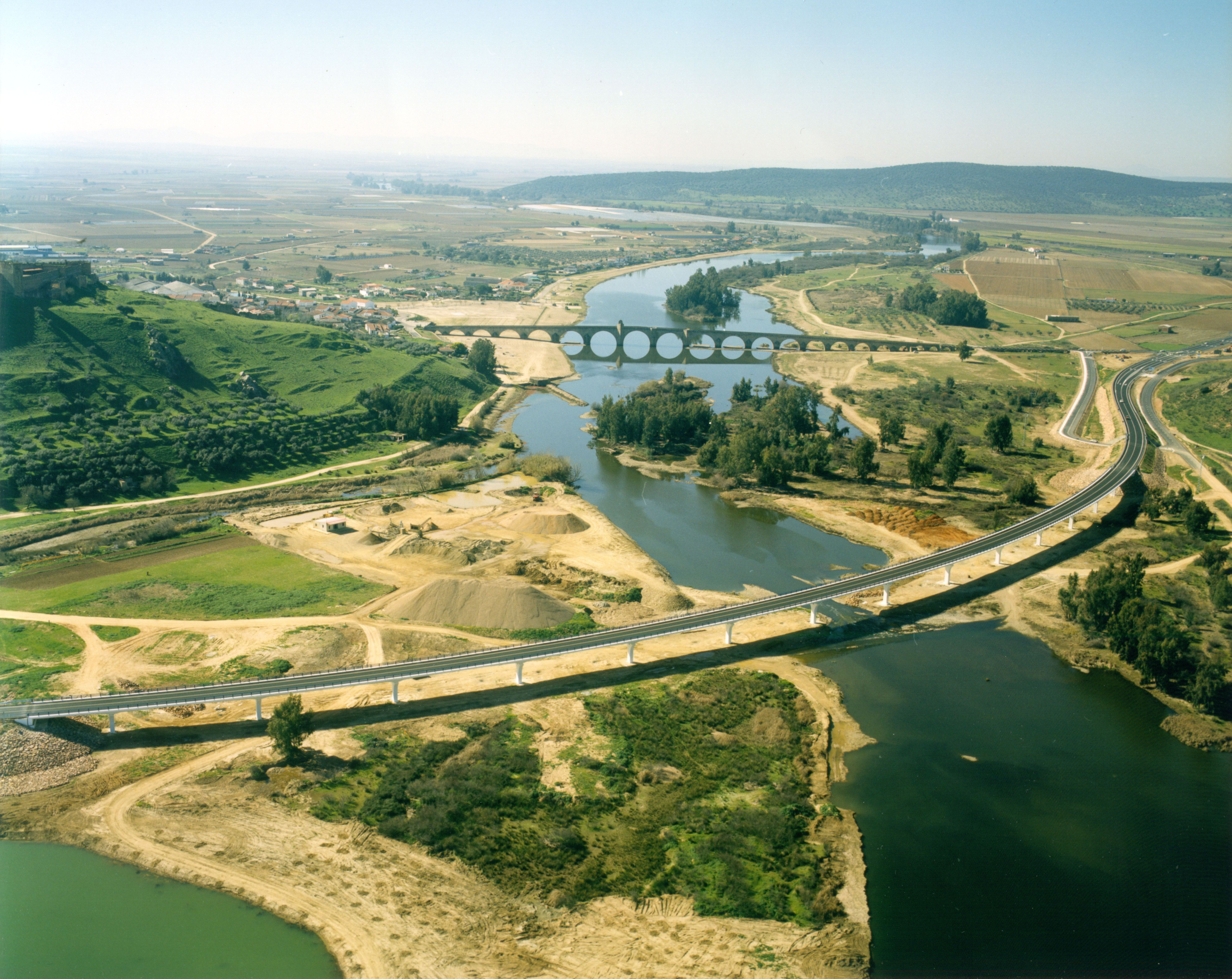 Panorámica de los dos puentes, de época barroca y moderno, que cruzan el Guadiana en la localidad de Medellín (Badajoz)